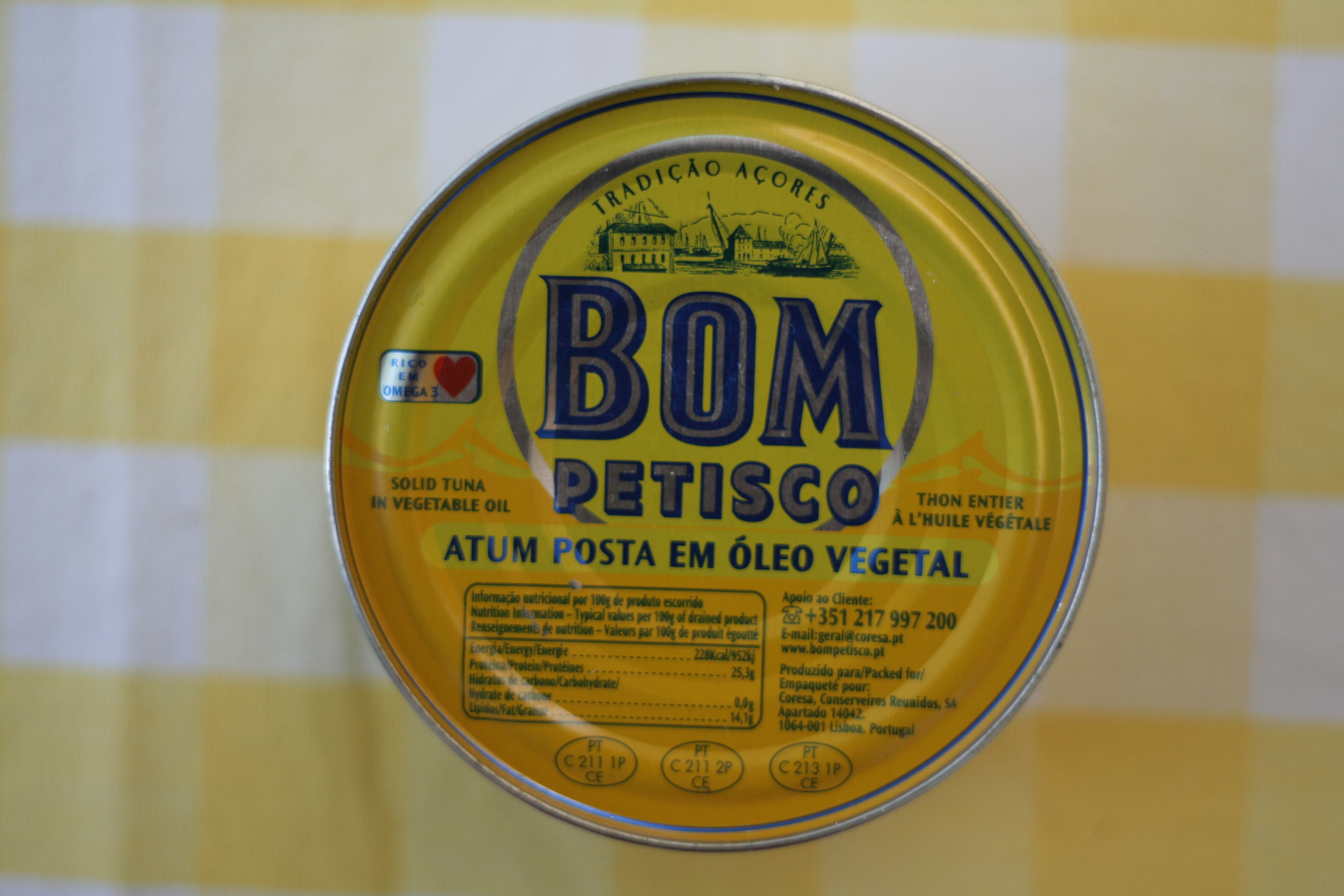 Atum Português Bom Petisco.